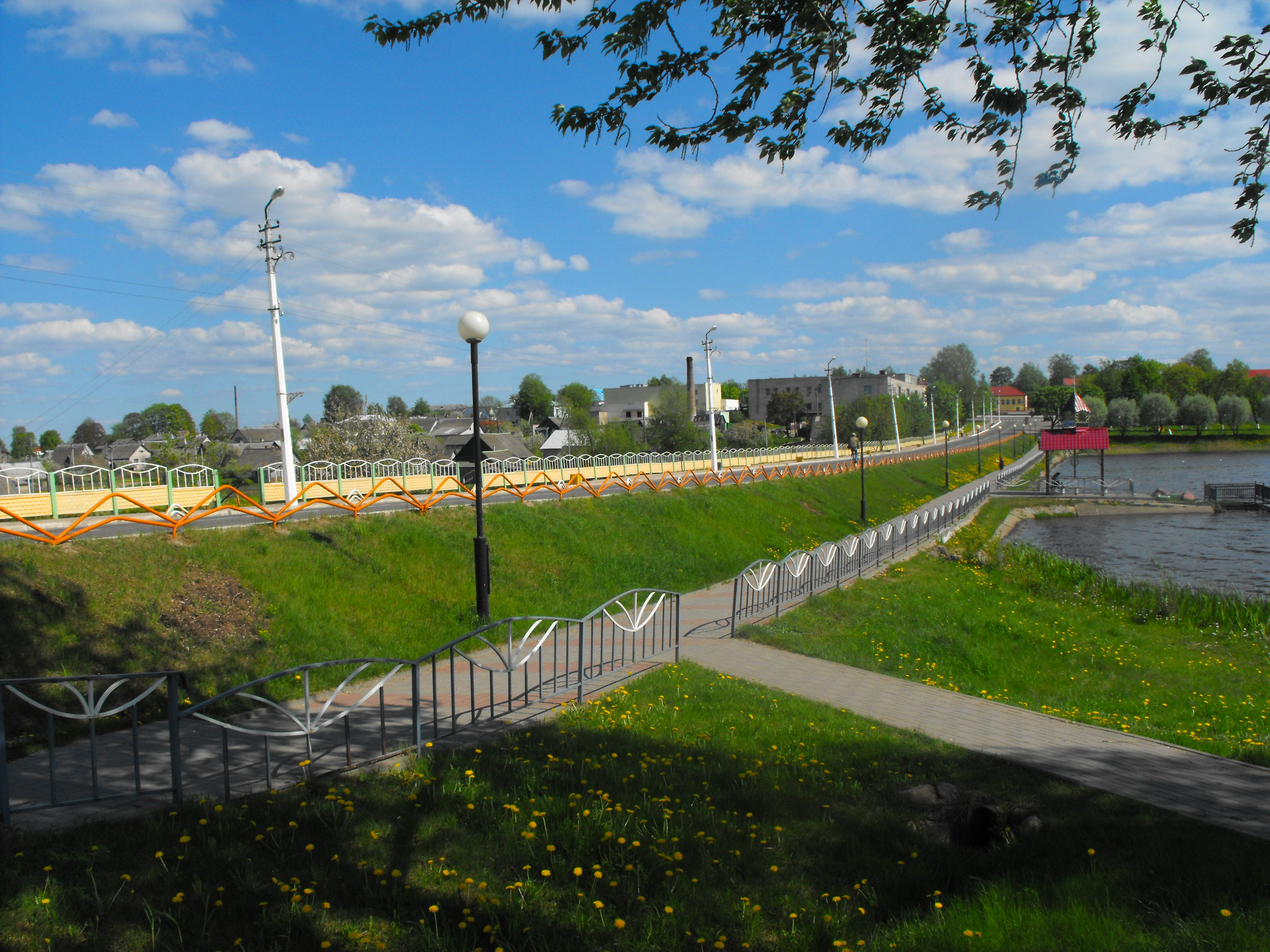 Докшицкое гетто, существовавшее во время Второй мировой войны, занимало территорию, ограниченную улицами Горького (бывшая Полоцкая), Советская (бывшая Глубокская), Интернациональная и рекой Березина. На снимке - вид на территорию Докшицкого гетто со стороны истока реки Березина по улице Советской.